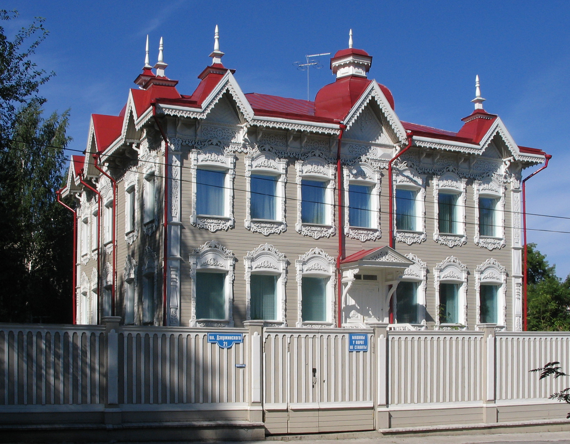 Дом по улице Дзержинского, 21